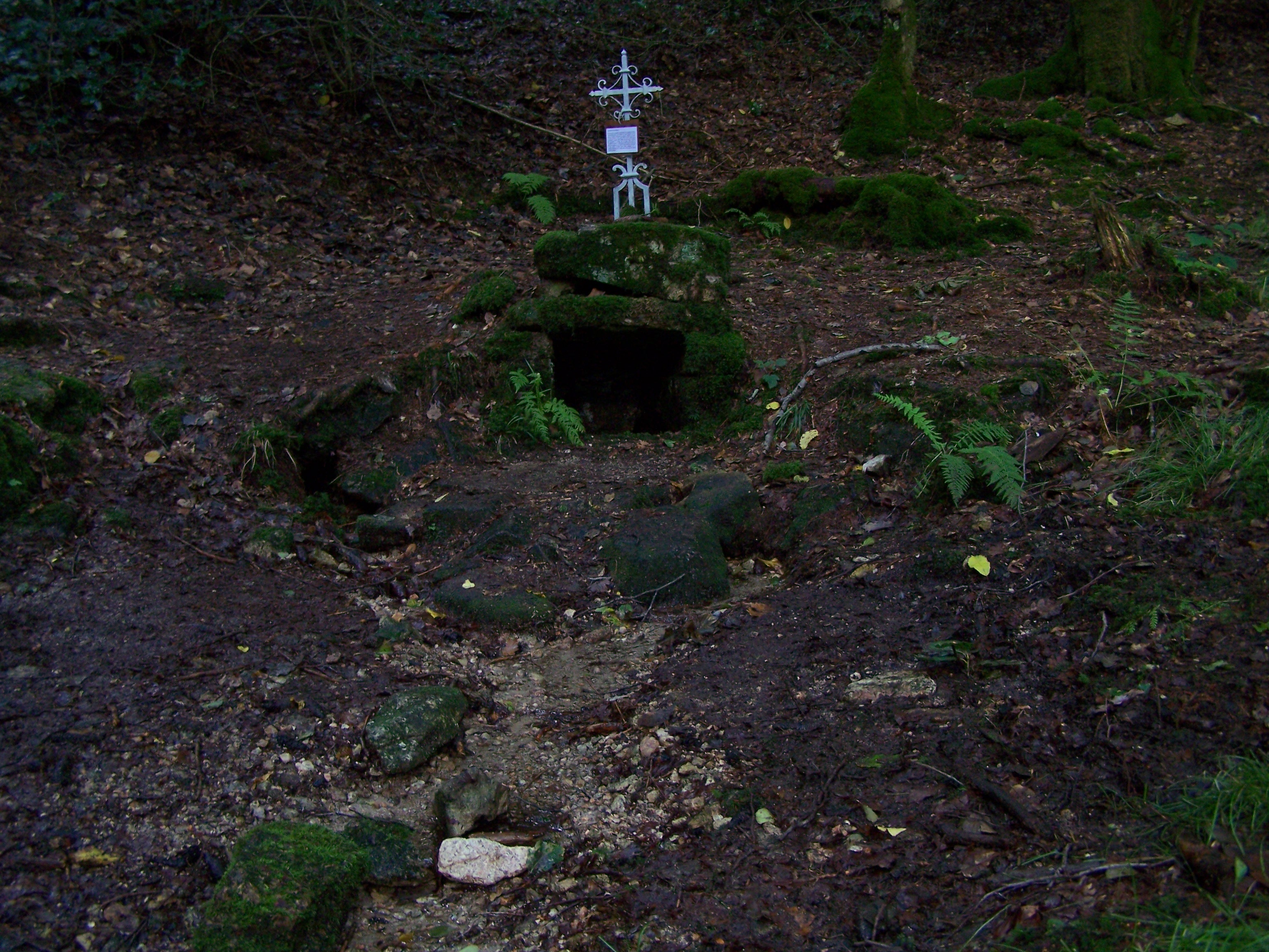 La "Fontaine du Frêne" près de la chapelle de Faubouloin dans la commune de Corancy (Nièvre, France).